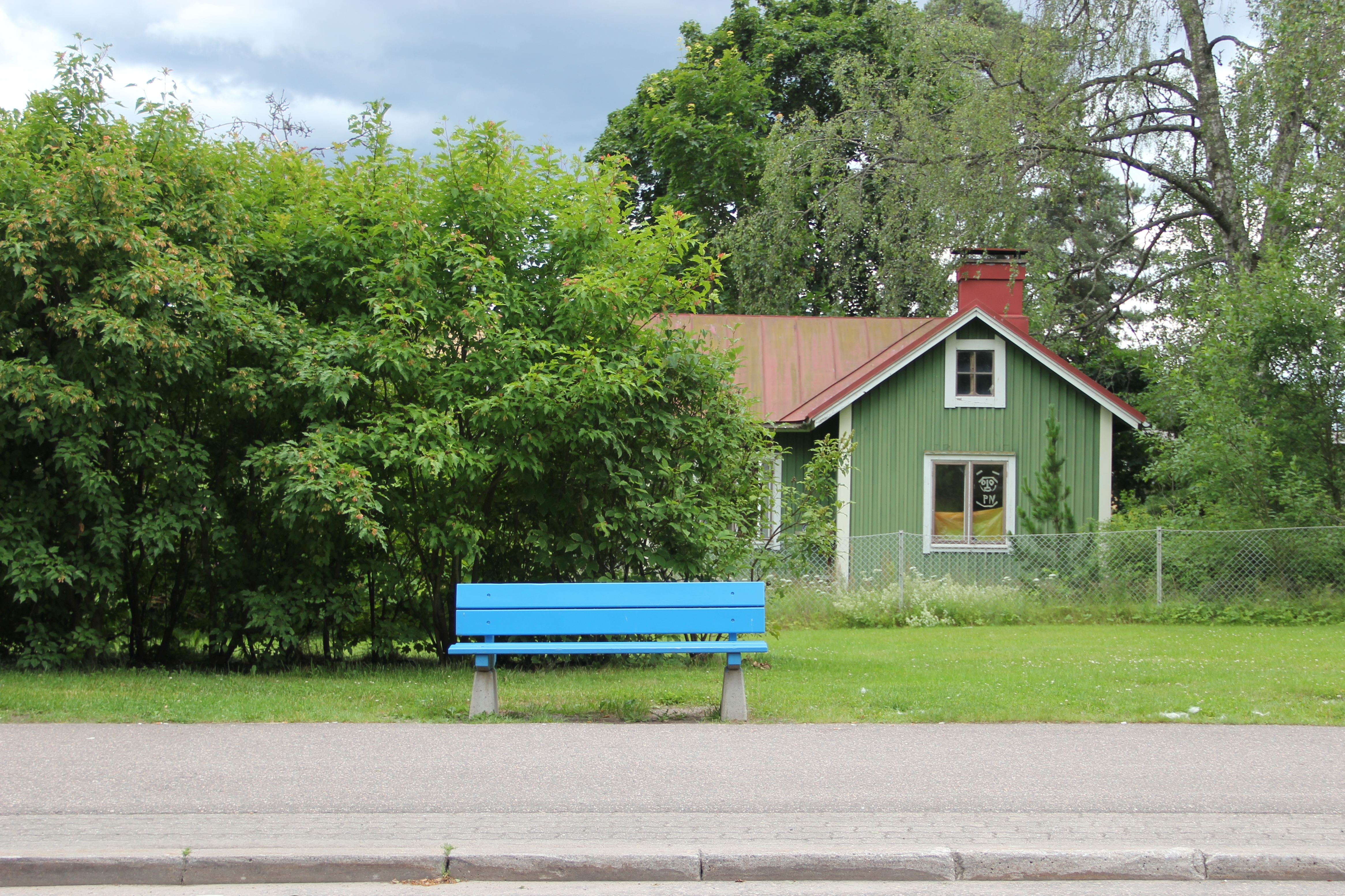 Asumaton vanha talo, Pisteenkaari, Nummela, Vihti